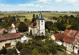 village d'Eckendorf